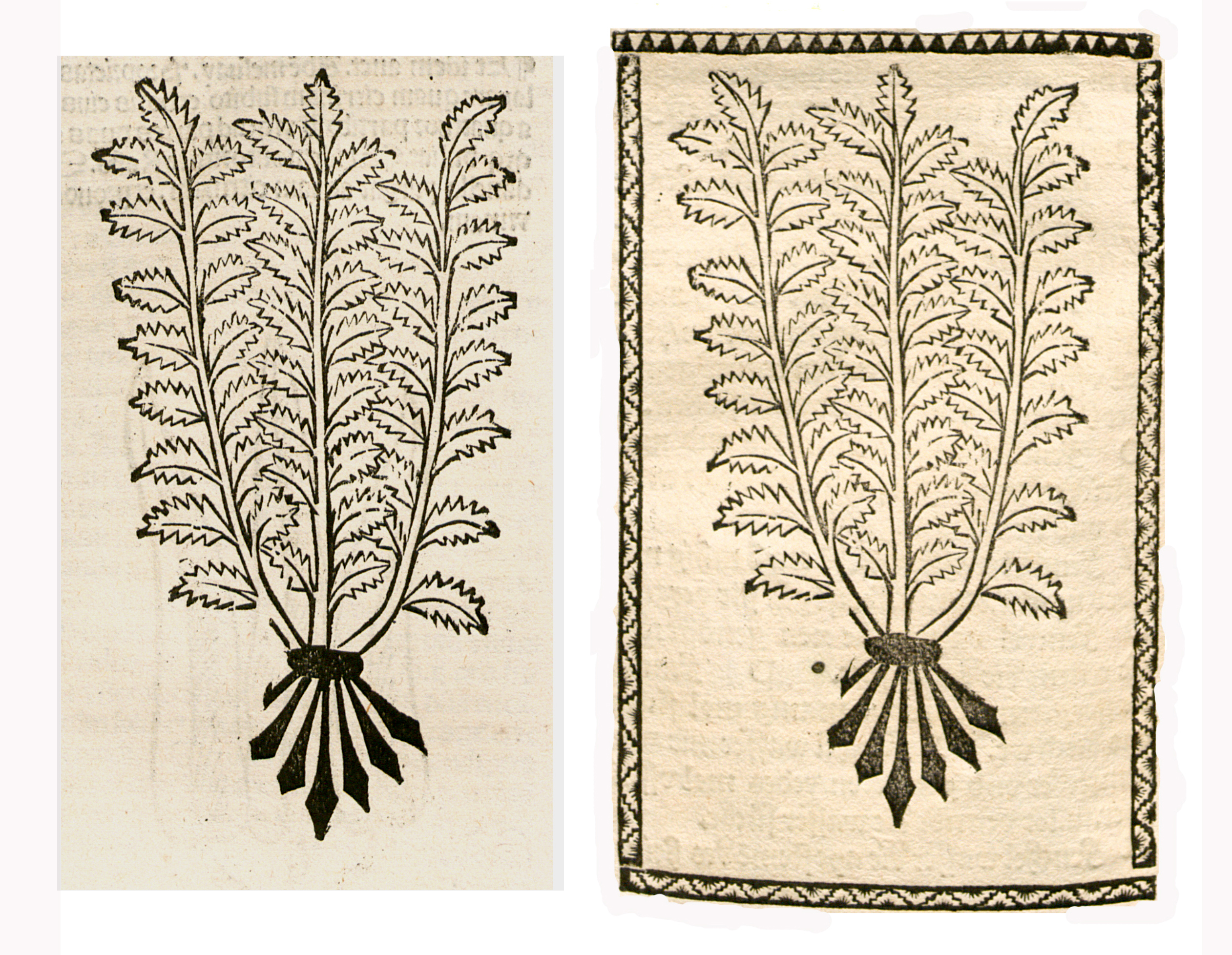 Abbildung zum Kapitel Filipendel (Filipendula vulgaris)